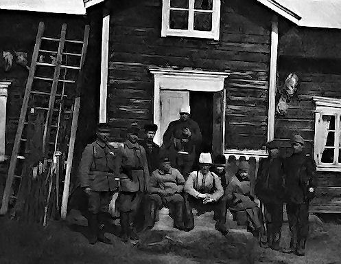 Kuusamon komennuskunnan päällystöä Vuorikylässä Kuolajärvellä.